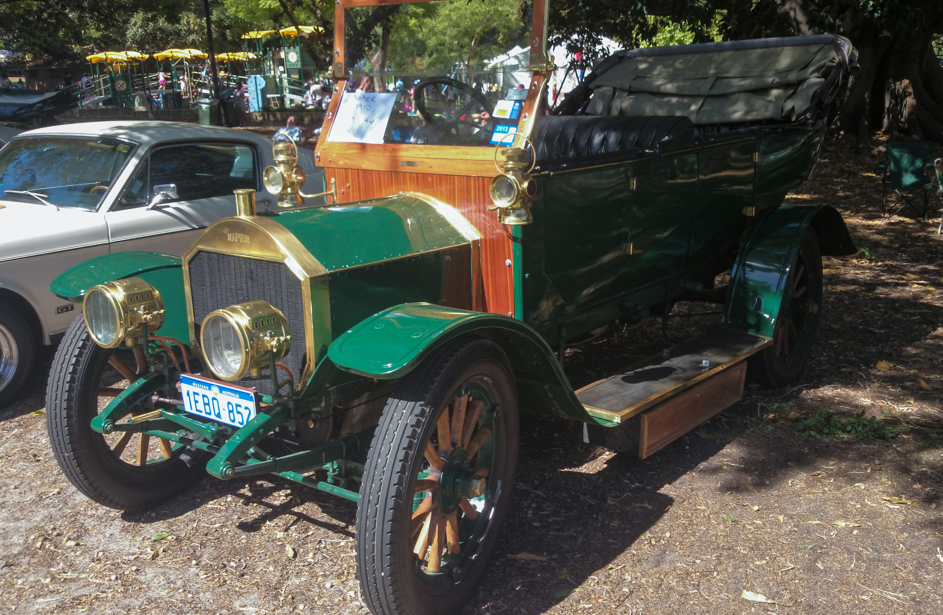 1910 Napier 15 hp 4-cylinder